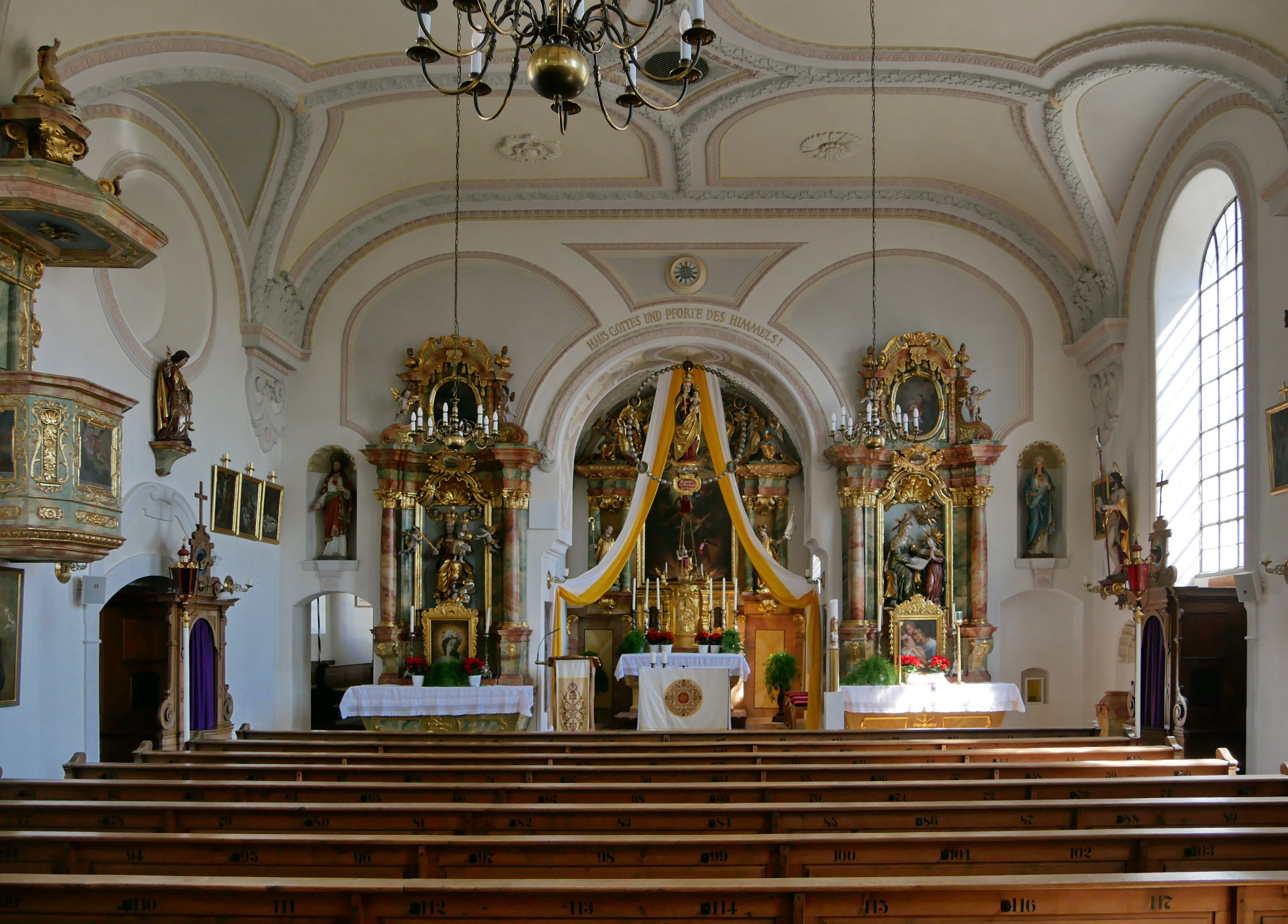 Maisach, Ortsteil Rottbach: Katholische Pfarrkirche St. Michael. Blick zum Altar